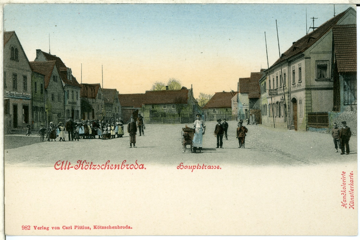 Radebeul; Alt-Kötzschenbroda, Hauptstraße This postcard is from publisher Brück & Sohn in Meißen ( postcard has a unique number 00982 and is available in a higher resolution at the publisher. This images was uploaded in a cooperation project between Wikipedians and the publisher.